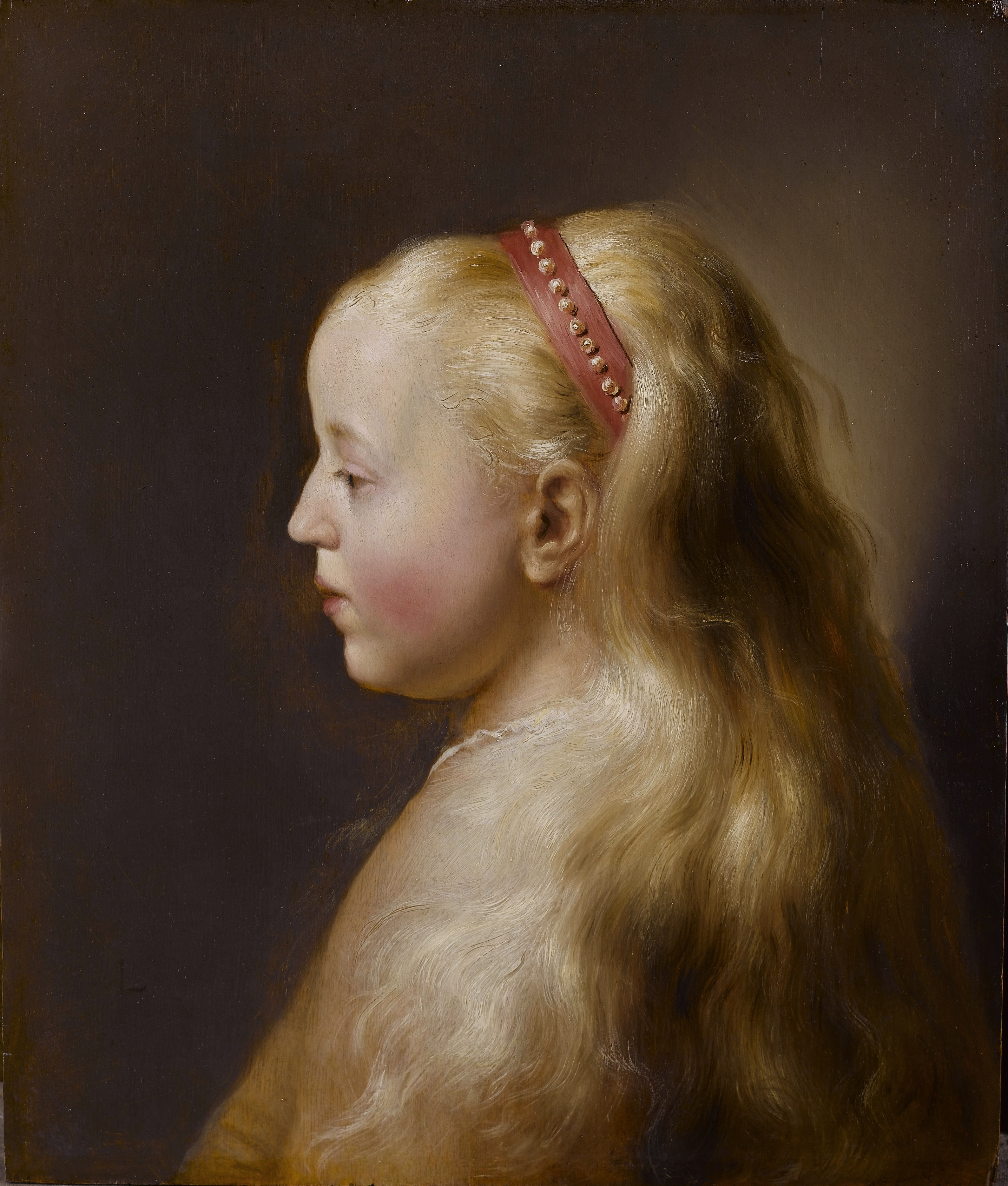 A young girl